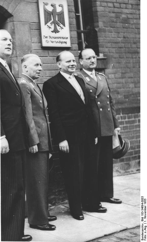 Note: This description has been identified as biased or incorrect: GDR propaganda language. ADN-ZB, 1.12.1955 Sie sind wieder da-die eingefleischten Militaristen An der Spitze derjenigen, die durch Adenauers Kriegsminister Blank ihre Ernennungsurkunde als Offiziere und Spieße für die NATO-Söldner-Division Bonns erhielten, stehen zwei alte eingefleischte Militaristen Heusinger und Speidel. Heusinger-einst Fahnenjunker in der kaiserlichen Armee und später Angehöriger der Reichswehr hatte von 1937 bis 1944 dem Generalstab der Hitlerarmee angehört und als Chef der Operativen Abteilung die Pläne für die Überfälle auf Deutschlands Nachbarvölker, speziell auf die UdSSR, mit ausgearbeitet. Gleiche Verbrechen plant er heute, so schrieb er am 10.10.1953 in den "Bonner Heften" "...angreifen, wo immer eine Chance sich dafür bietet. Mit dieser Kampfmethode sollte der Westen dem Osten gegenübertreten..." Kriegsverbrecher Speidel gilt bei den NATO-Strategen als der Frankreich -"Spezialist". Als Gehilfe des Nazimilitärattaches in der Pariser Botschaft half er mit, im französischen Offizierskorps die fünfte Kolonnezu organisieren. Später war er Generalstabschef der VIII. Italienischen Armee an der Stalingradfront, wo unter seinem Kommando die italienischen Söldner rücksichtslos in den Tod getrieben wurden. Bei seinem Rückzug demonstrierte er die Taktik der "verbrannten Erde". Mit diesen beiden Militaristen beabsichtigen die Bonner Revanchepolitiker, die Politik des "kalten Krieges" in einen heißen umzuwandeln. UBz: Von rechts nach links: Speidel, Blank und Heusinger.